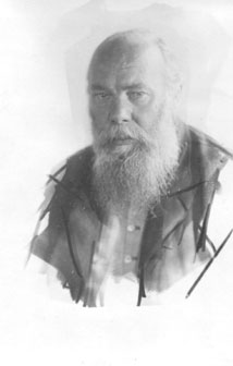 Aleksei Melnikov (1867–1934), vene jurist